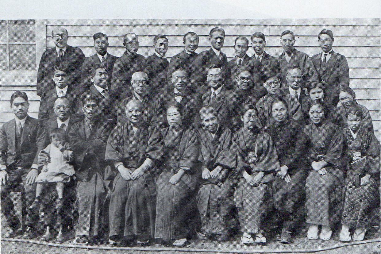 中田重治、小原十三司と一緒の聖書学院教役者会